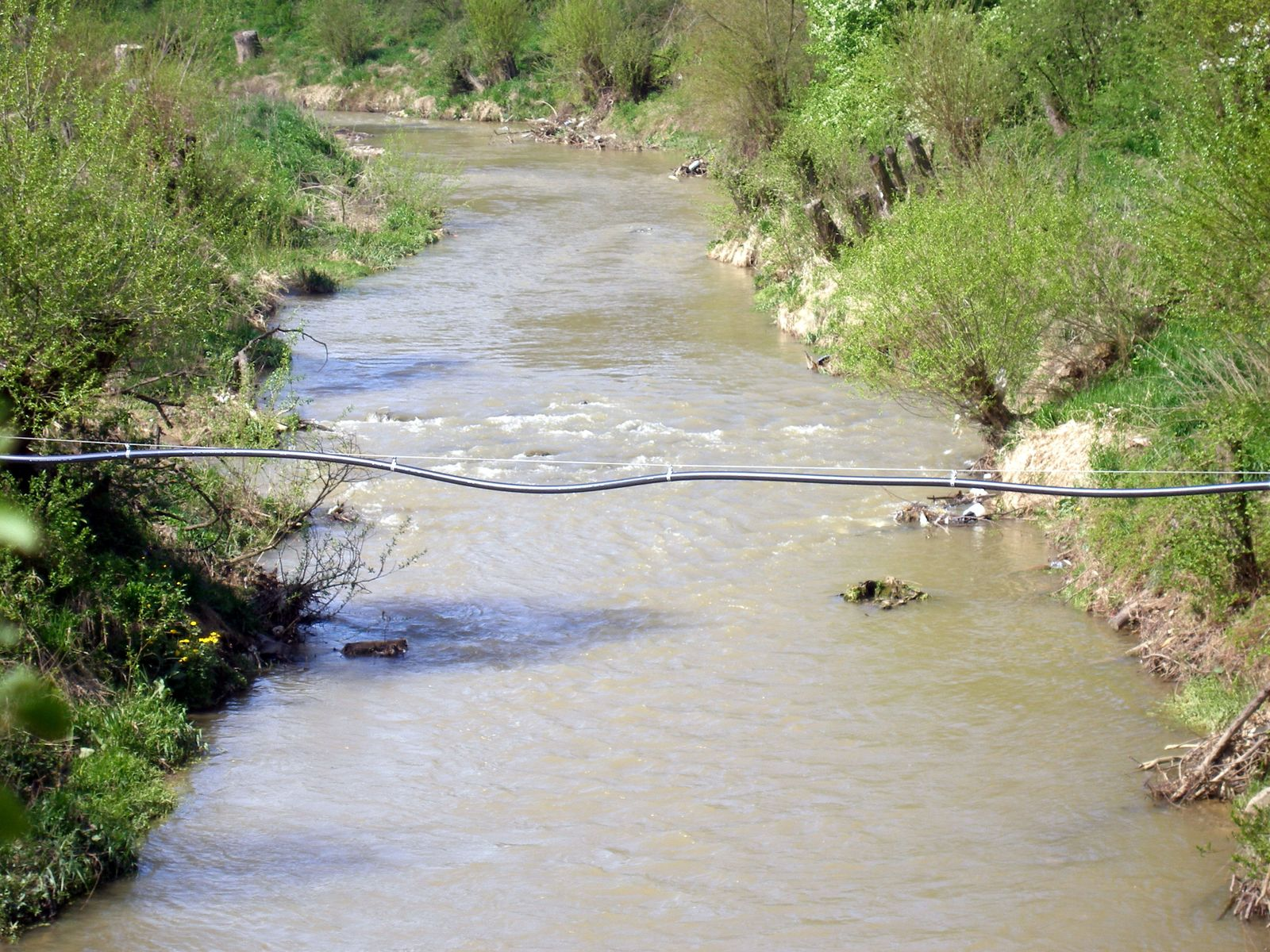 Obec Janov a okolie. Okres Prešov, región Šariš.